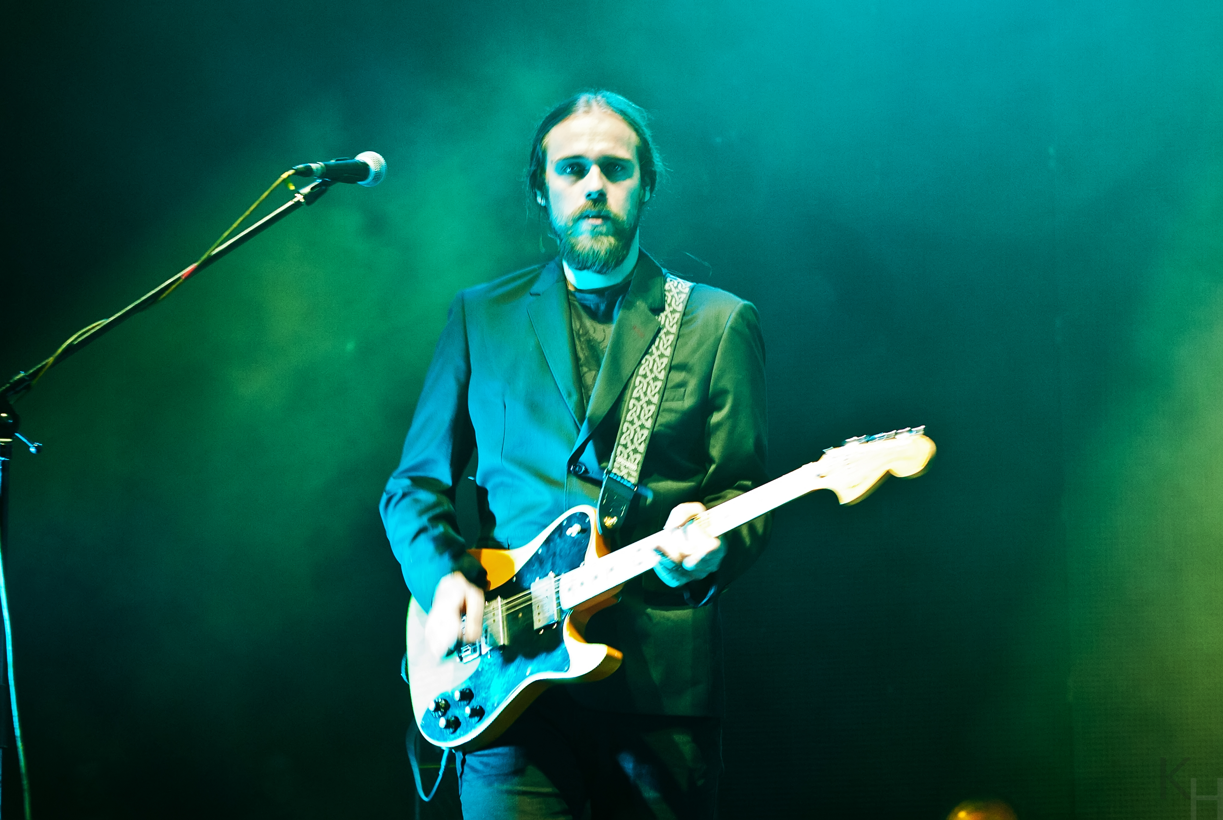 Владимир Опсеница. Концерт ОЕ в Киеве.